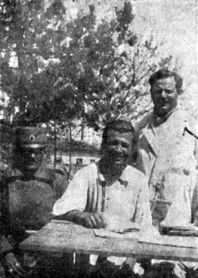 Srpskohrvatski / српскохрватски: Đuro Salaj i Filip Filipović u zatvorskoj bolnici u Požarevcu 1922. godine.